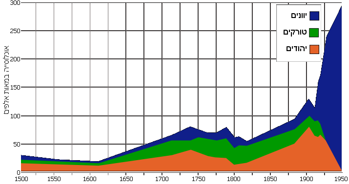 אוכלוסיית סלוניקי